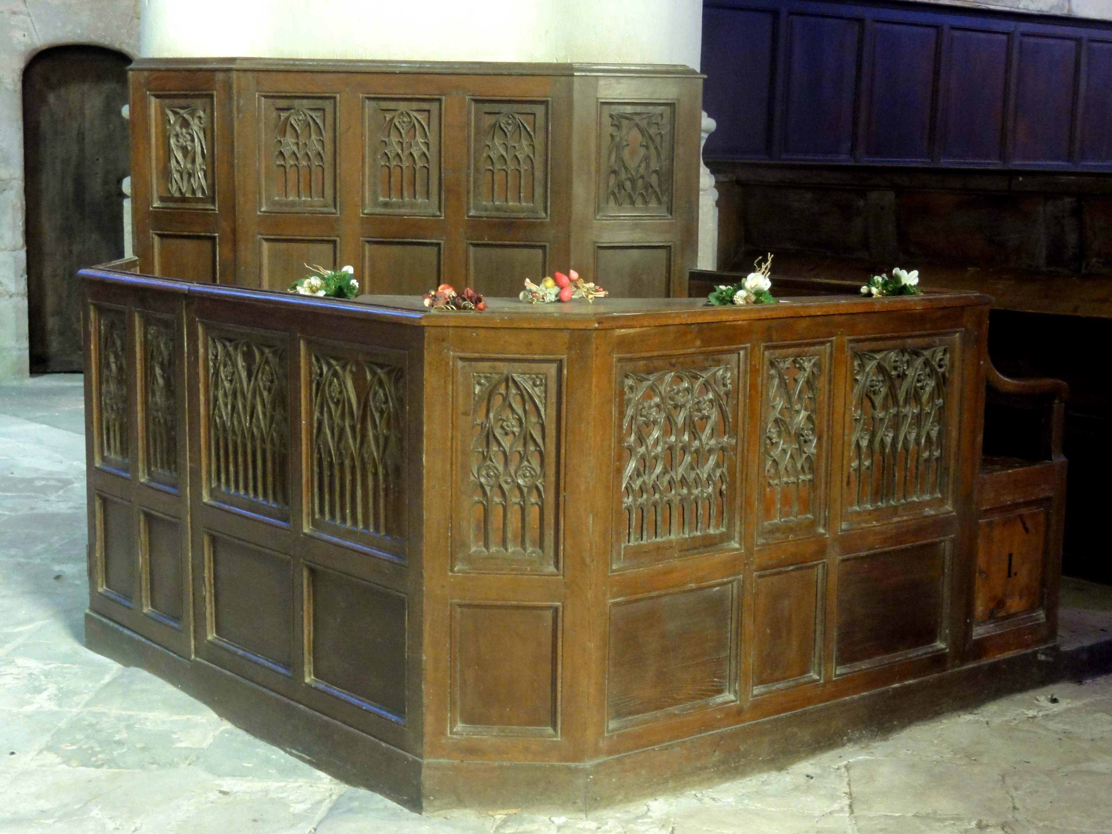 Banc d'œuvre, devant la pile nord-est du clocher.